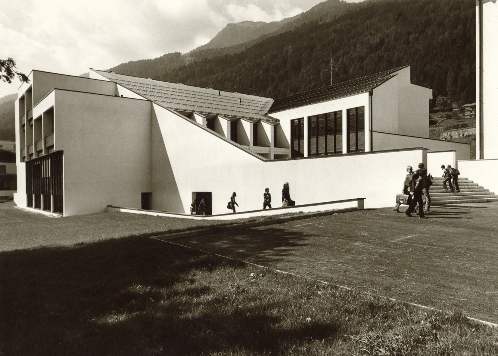 Hauptschule Fulpmes (A) This media shows the remarkable cultural object in the Austrian state of Tyrol listed by the Tyrolean Art Cadastre with the ID 44896. (on tirisMaps, pdf, more images on Commons)